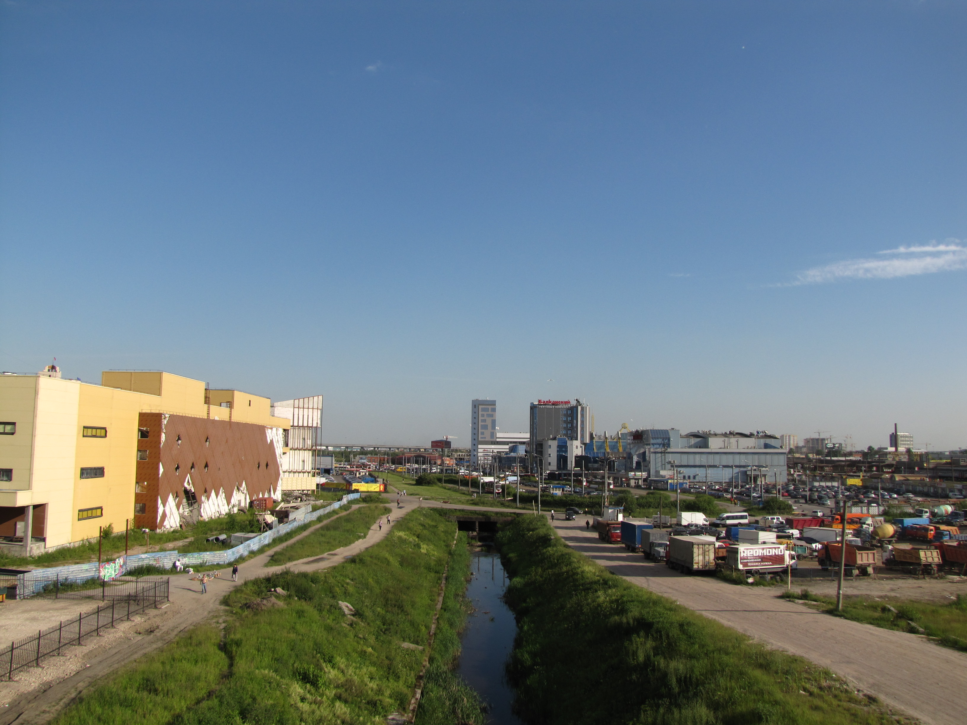 Над волковкой